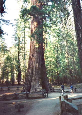 California Tree, Giant Sequoia (Sequoiadendron giganteum), Mariposa Grove, Yosemite National Park